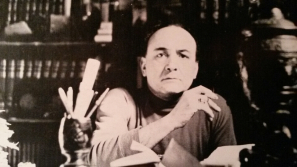 Carlo Franzini "Saturnino" , pittore e artista lirico italiano.